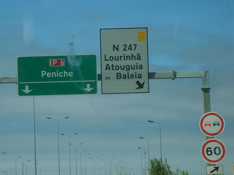 Lourinha IP6